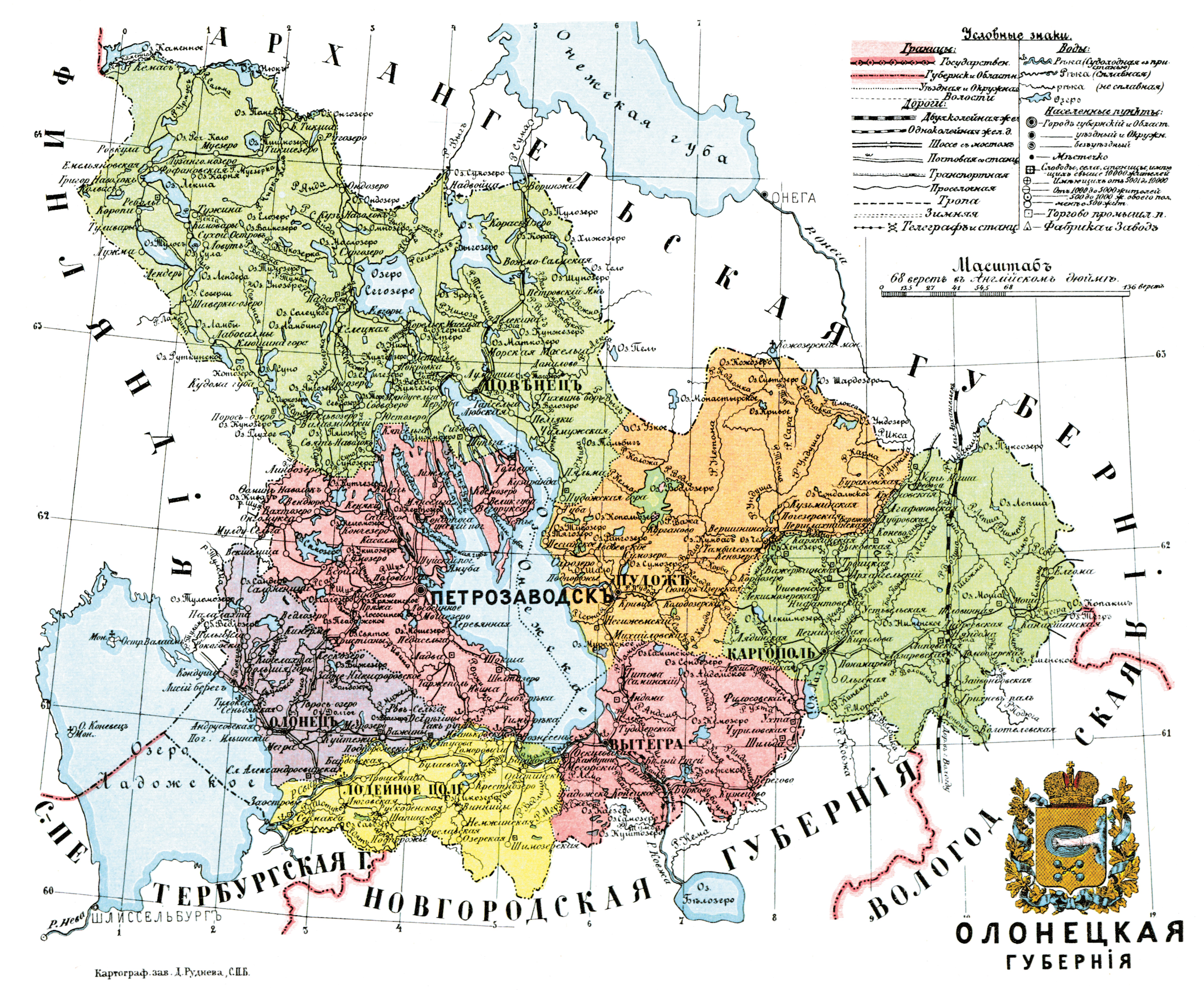 Карта Олонецкой губернии в Атласе "Россия. Географическое описание Российское Империи по губерниям и областям с географическими картами" СПб, 1913 г.